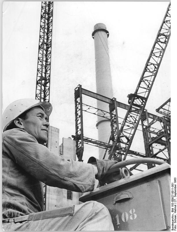 Zentralbild-Schaar 27.9.1963 Bauarbeiter von Leuna II haben Planrückstände aufgeholt Den Bau- und Montagearbeitern auf der Großbaustelle Leuna II im Bezirk Halle ist es in gemeinsamen Anstrengungen gelungen, die zu Beginn des Jahres entstandenen Planrückstände von 49 Tagen restlos aufzuholen. Damit haben sie jetzt die richtige Ausgangsposition, um ihr Ziel, - bis zum Jahrestag der Republik zwei Tage Planvorsprung sicher zu erreichen. UBz.: Reinhard Goldacker vom VEB Brücken- und Stahlbau Leipzig bedient die Kranwinde bei der Montage des Kesselhauses am Kraftwerk.